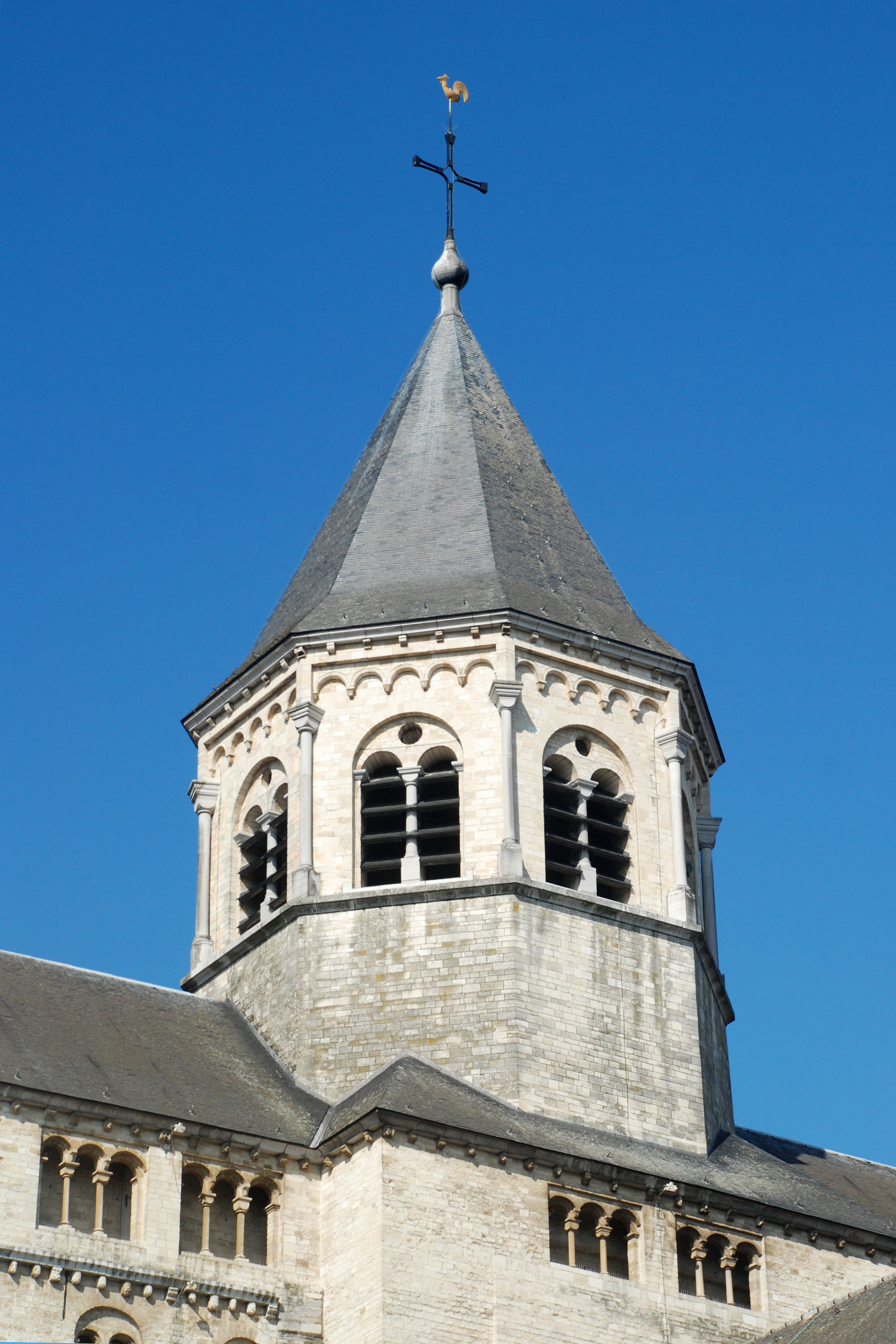 Belgique - Brabant wallon - Nivelles - Collégiale Sainte-Gertrude